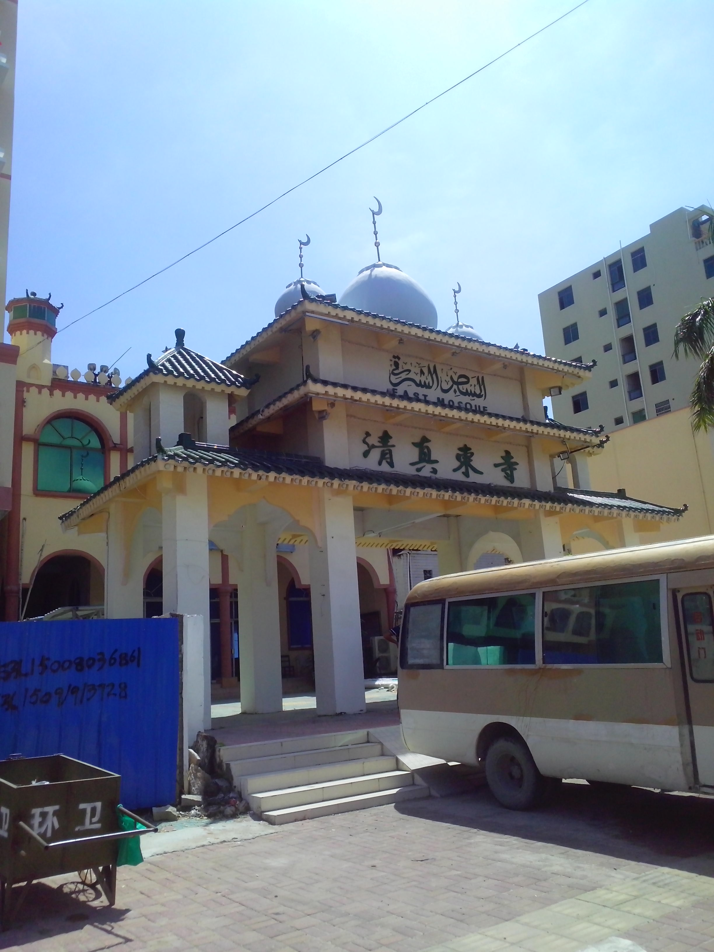 三亚凤凰清真东寺